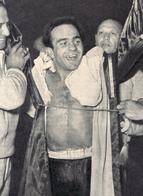 photo from Italian magazine Avanguardia, 1956.